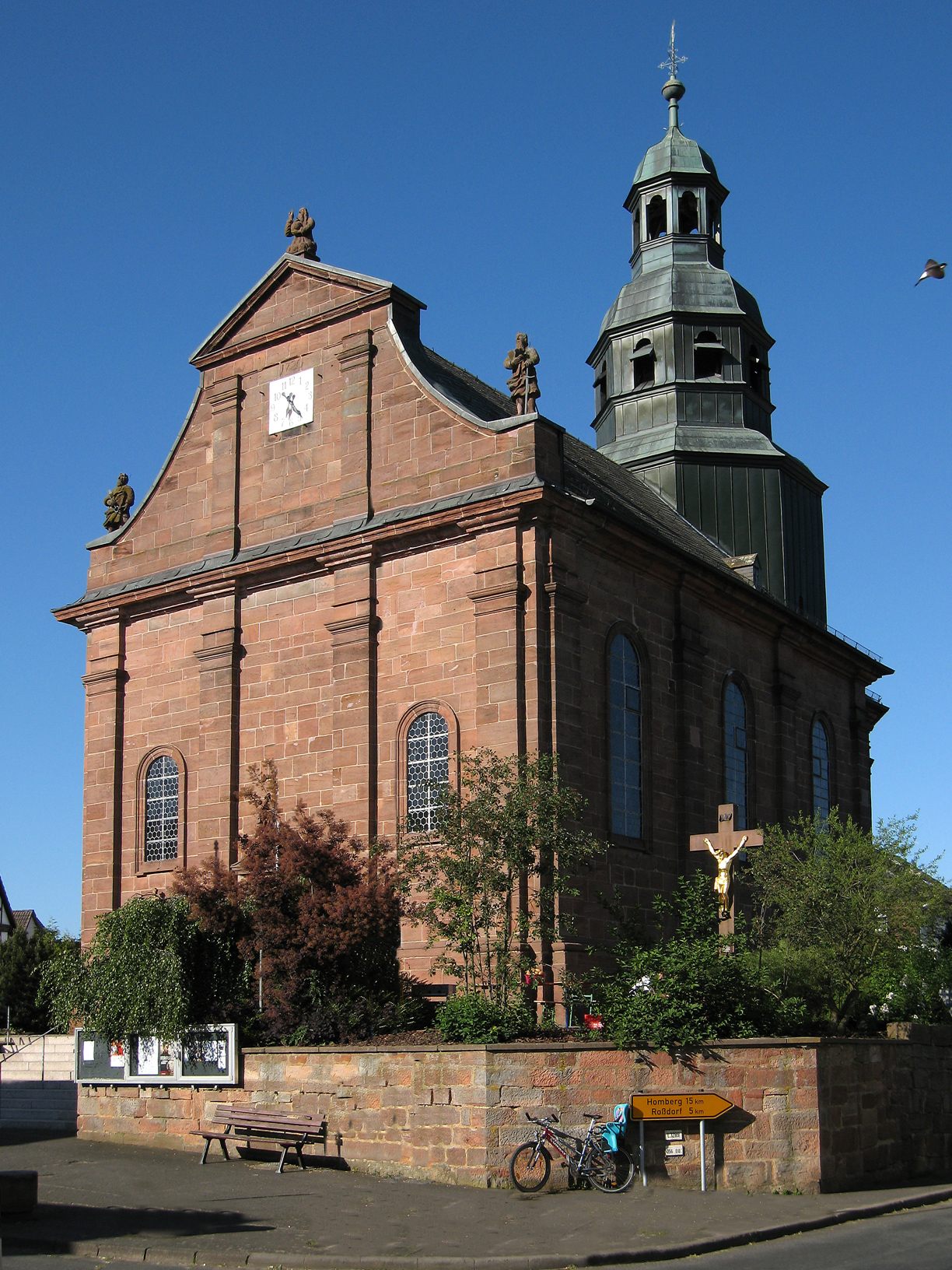 Church of Schröck